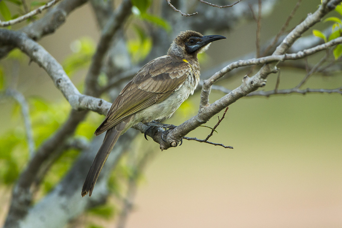 Little Friarbird - Darwin_S4E4871